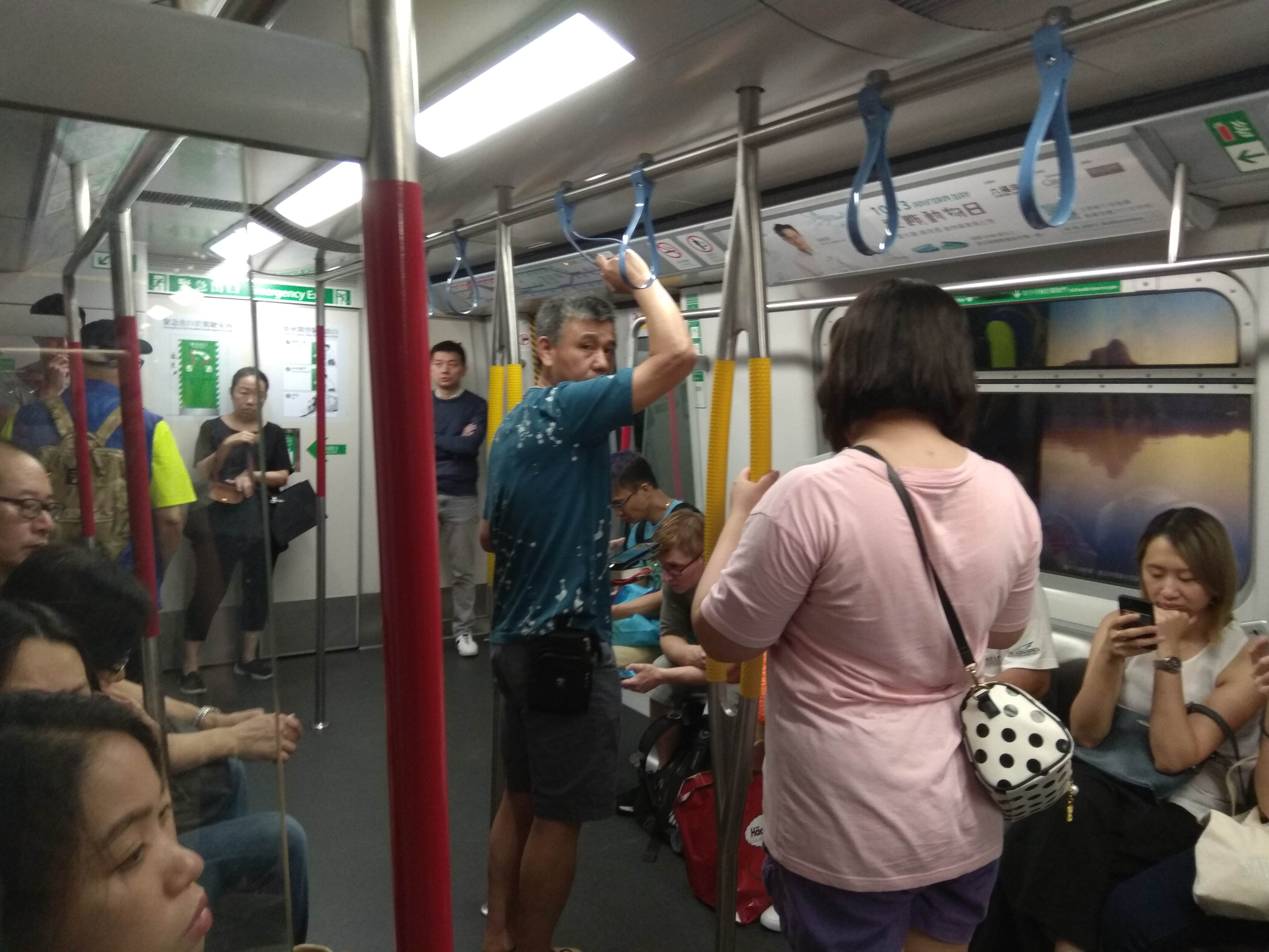 中文（香港）: 橄欖型扶手